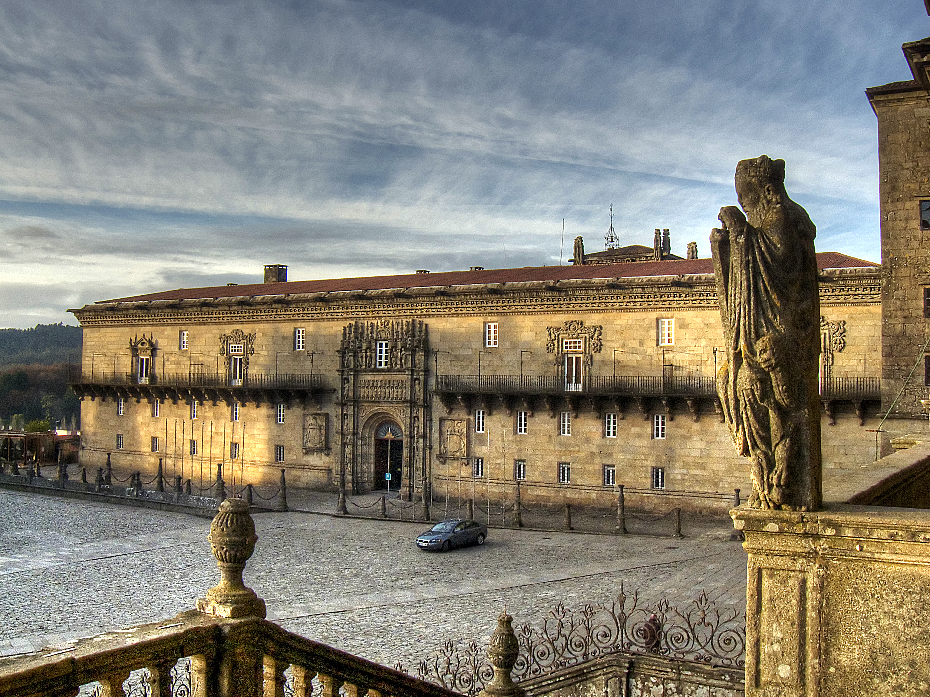 Hostal dos Reis Católicos. Praza do Obradoiro. Santiago de Compostela